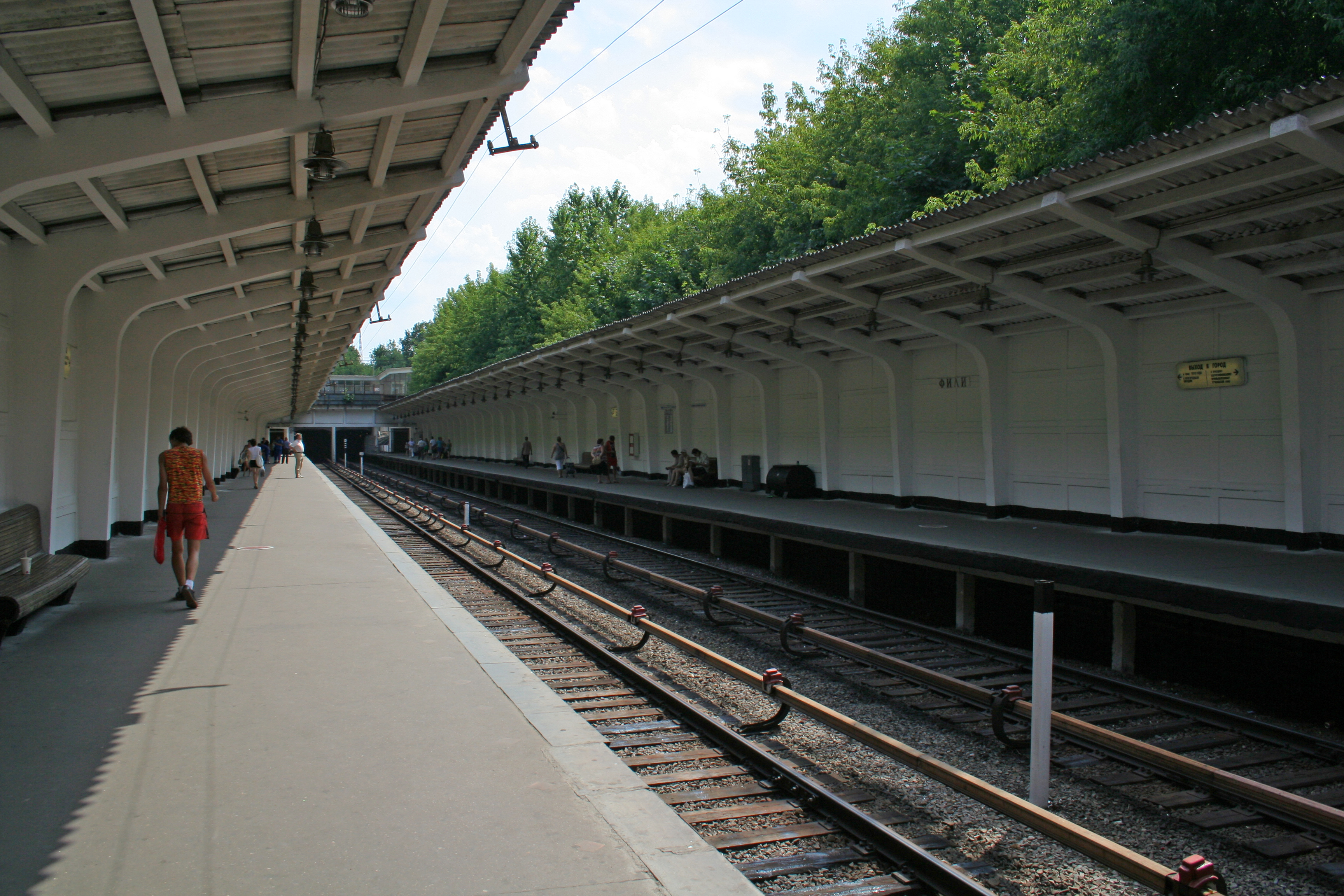 U-Bahnhof Fili der Metro Moskau